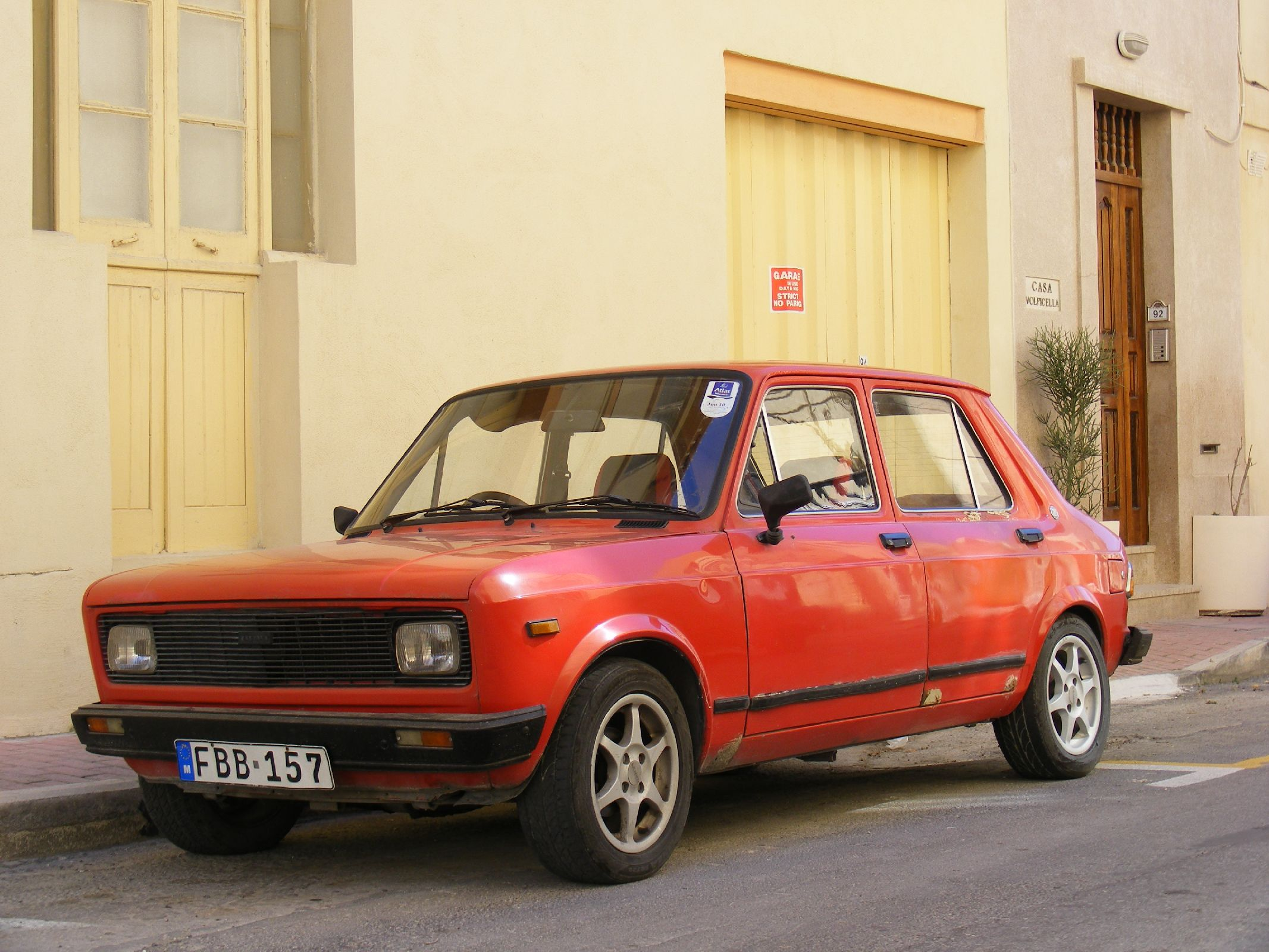 Zastava 101S or 101SC in Malta.